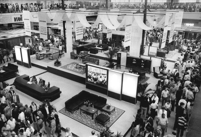 Leipzig, Herbstmesse, Möbelbranche ADN-ZB Pätzold-7.9.81 Leipzig: Herbstmesse 81-Die DDR-Möbelindustrie zeigt in der Halle 15 auf einer Fläche von 6 300 Quadratmetern ein Leistungsfähiges Produktionsprogramm. Rund 600 Modelle werden von den verschiedenen Möbelkominaten vorgestellt.